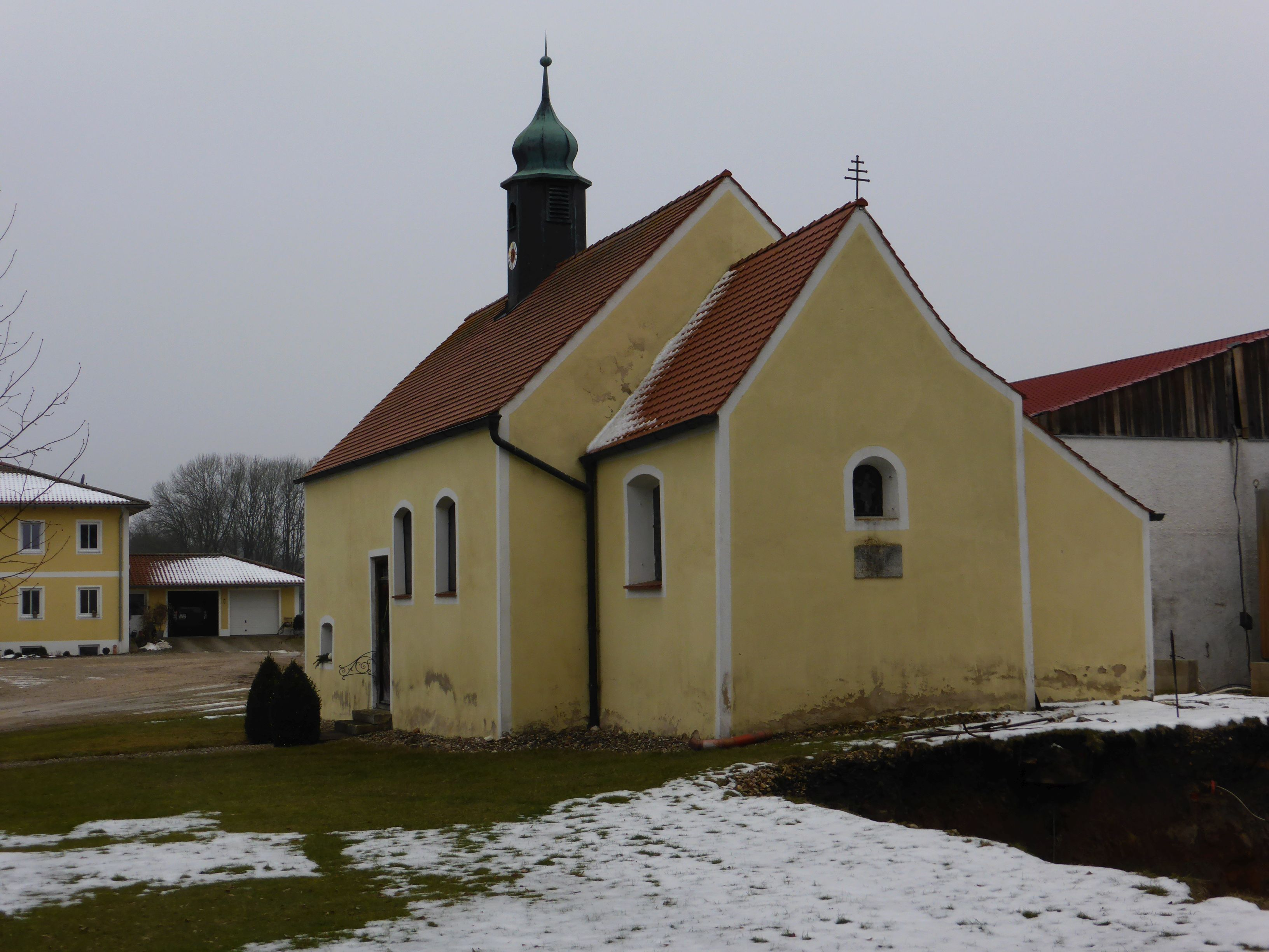 St. Gilla (Filialkirche St. Stephan)